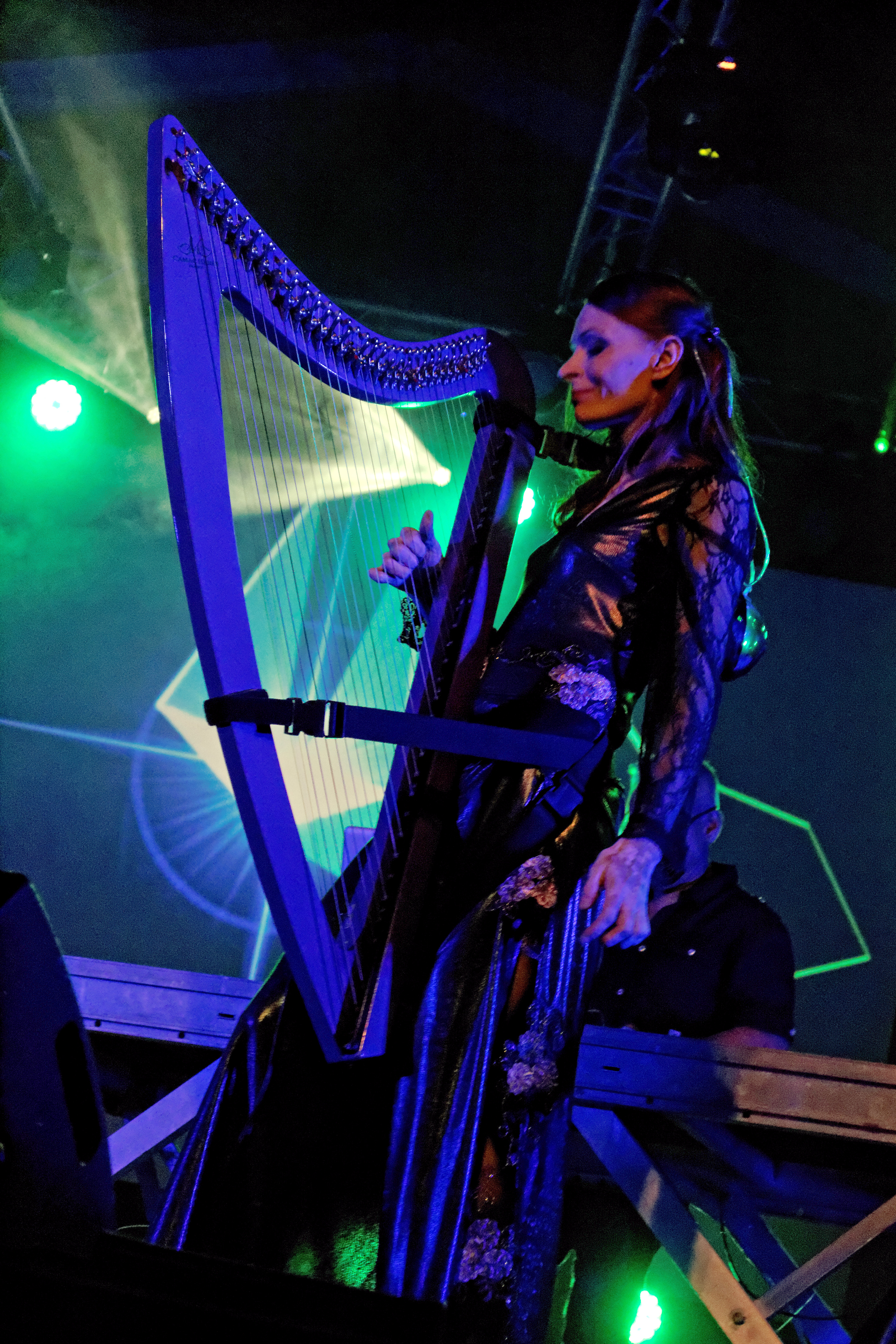 Arneo en concert à l'espace Pierre-Jakez Hélias lors du festival de Cornouaille 2014.